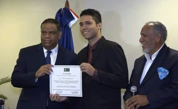 Jomi Santelises recibe reconocimiento por el Ministro de deportes de Republica Domninicana Danilo Diaz.